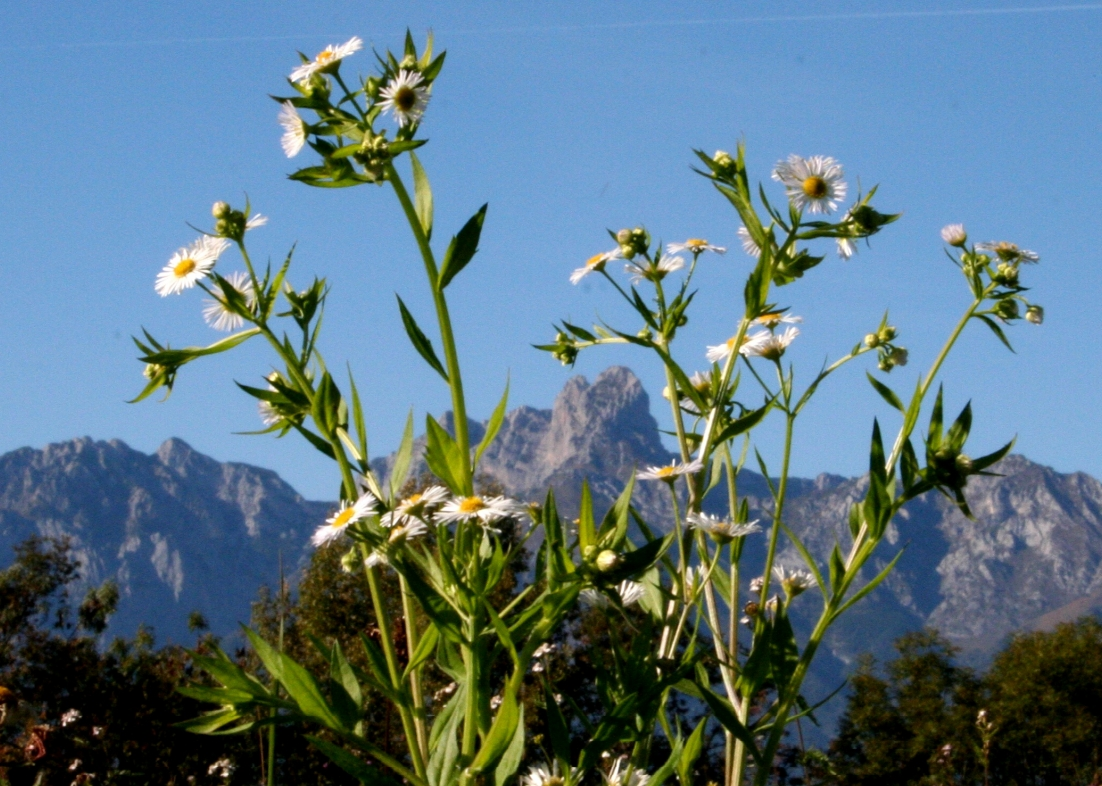 Erigeron_annuus_subsp._annuus (Cespica annua)